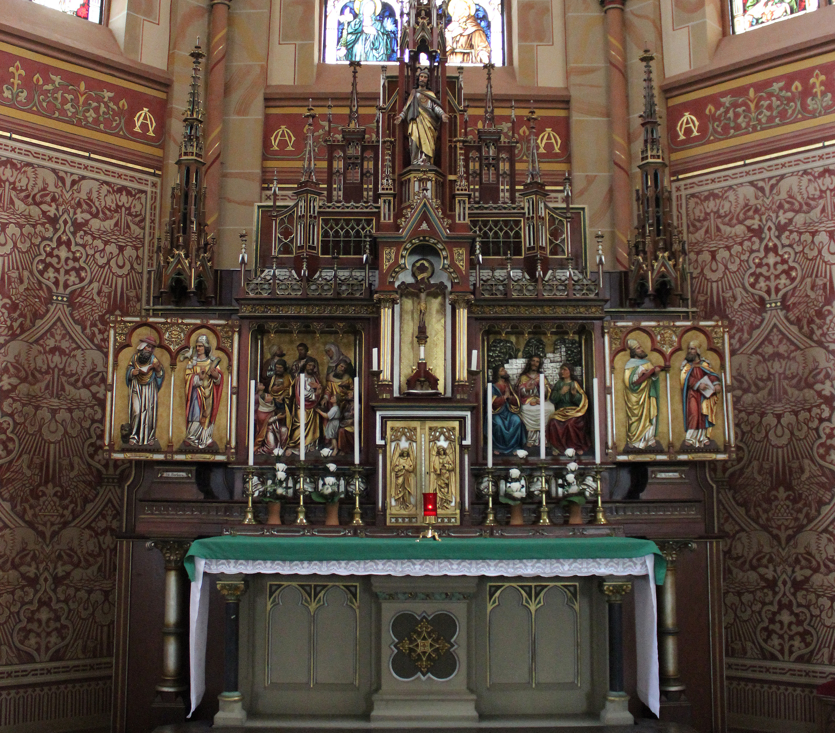 Hochaltar der katholischen Pfarrkirche Herz Jesu in Nunkirchen, einem Stadtteil von Wadern, Landkreis Merzig-Wadern, Saarland